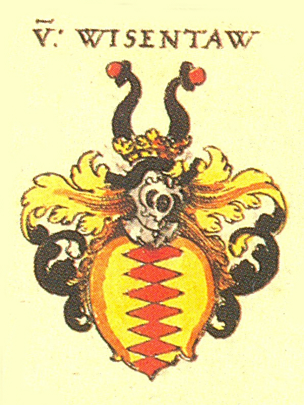 Wappen der Fränkischen Adelsfamilie Wiesenthau